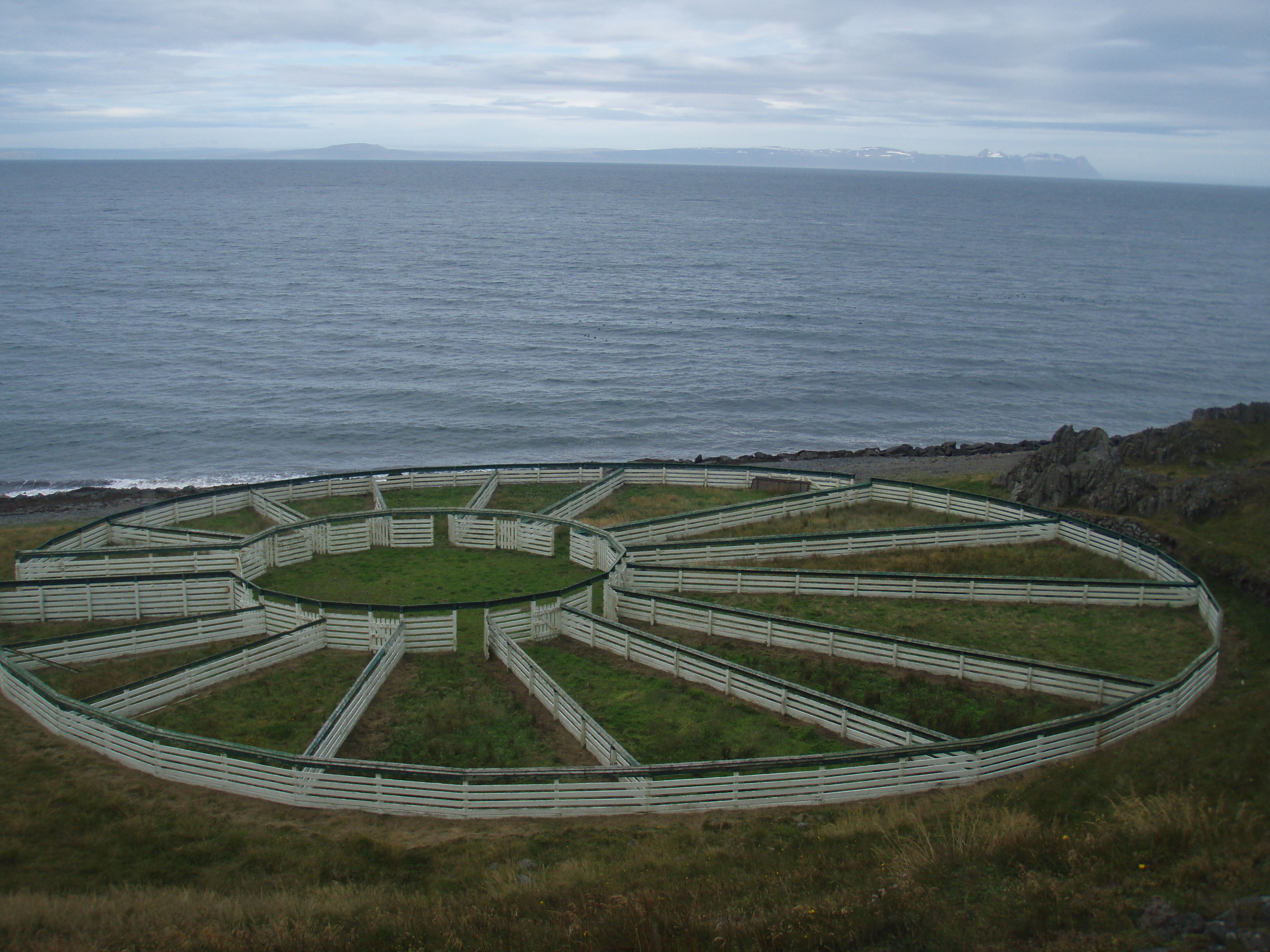 Hamarsrétt Vatnsnesi